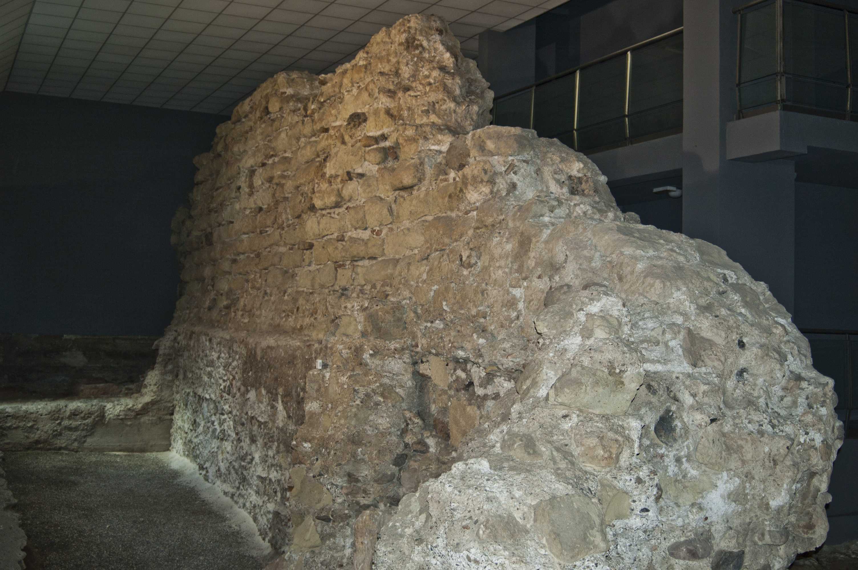 Enclave Arqueológico de Almería. Muralla